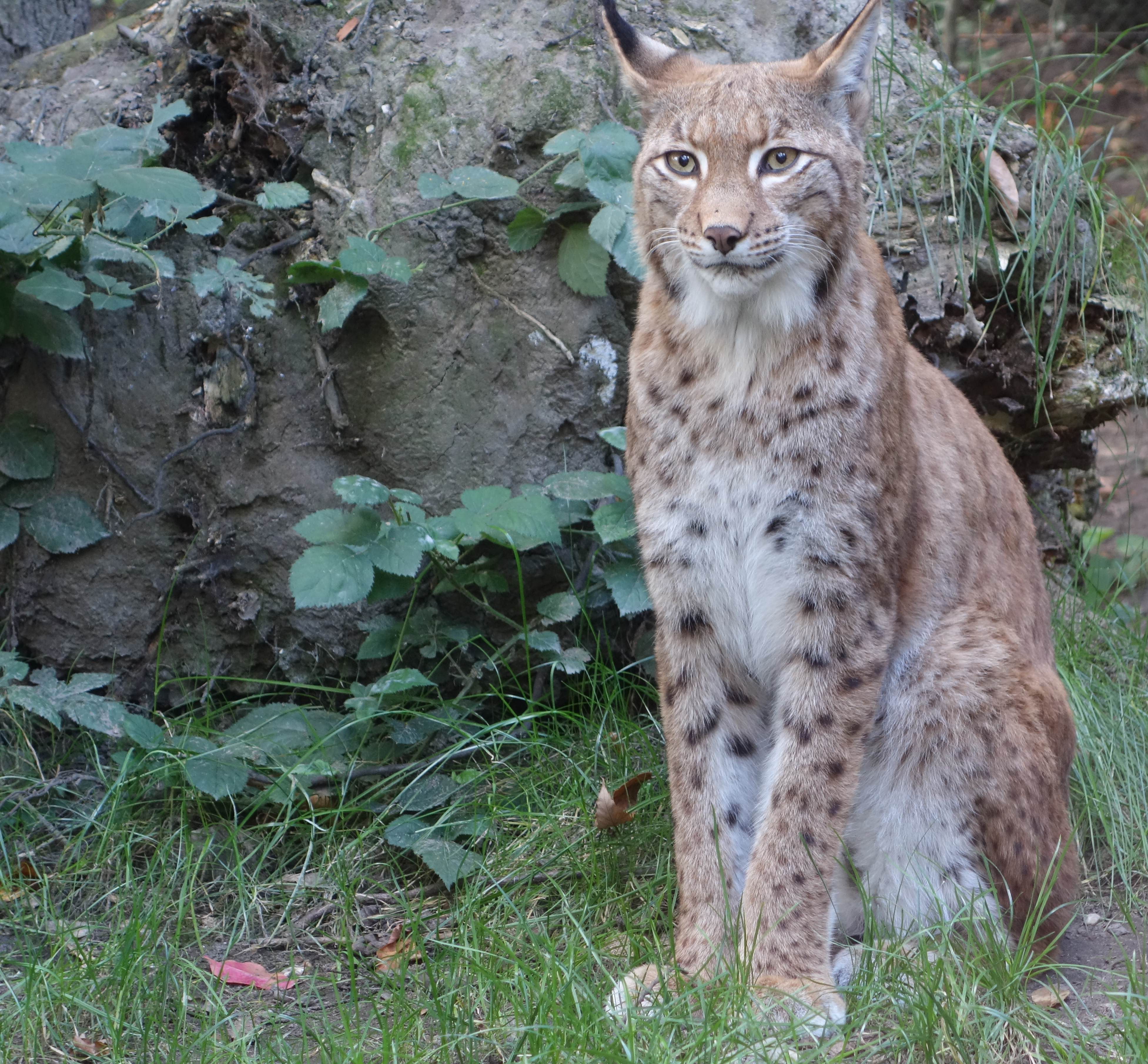 Duisburger Zoo, 16. September 2014.